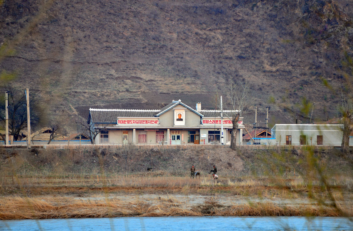 咸镜北道水口浦站